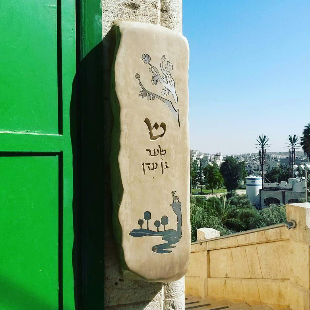 בכניסה הראשית קבועה מזוזה מאבן בעלת אותיות עבריות. יצירתו של האמן אסף קדרון